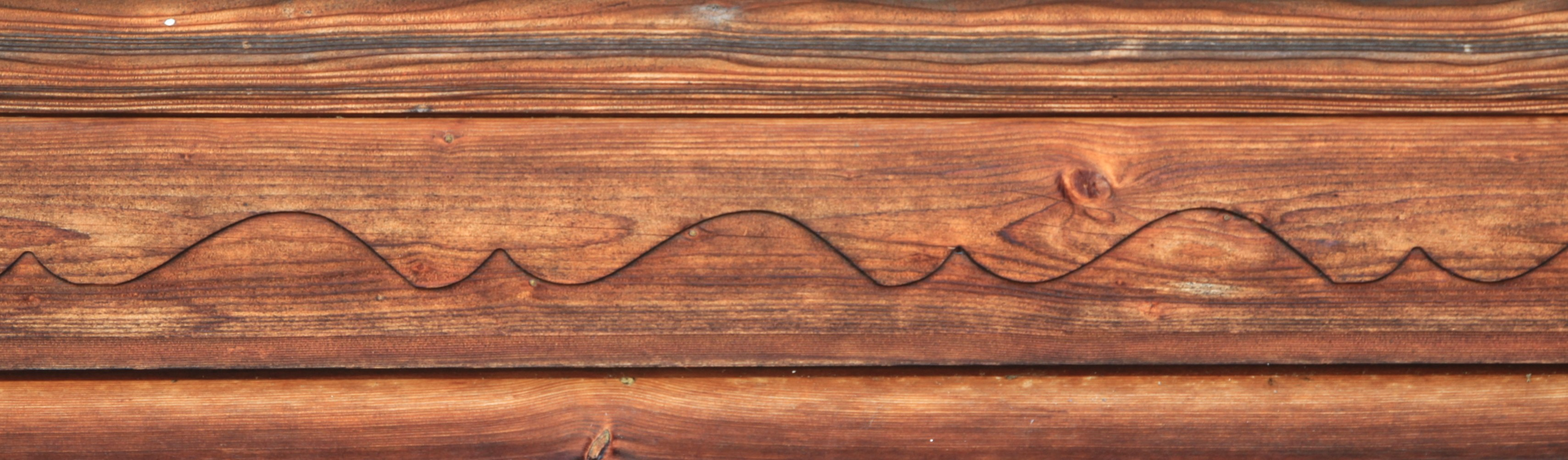 Karniesfries an der Giebelfront des sogenannten Sigristenhauses in Tafers/Schweiz aus dem 18. Jh., heute Sensler Museum